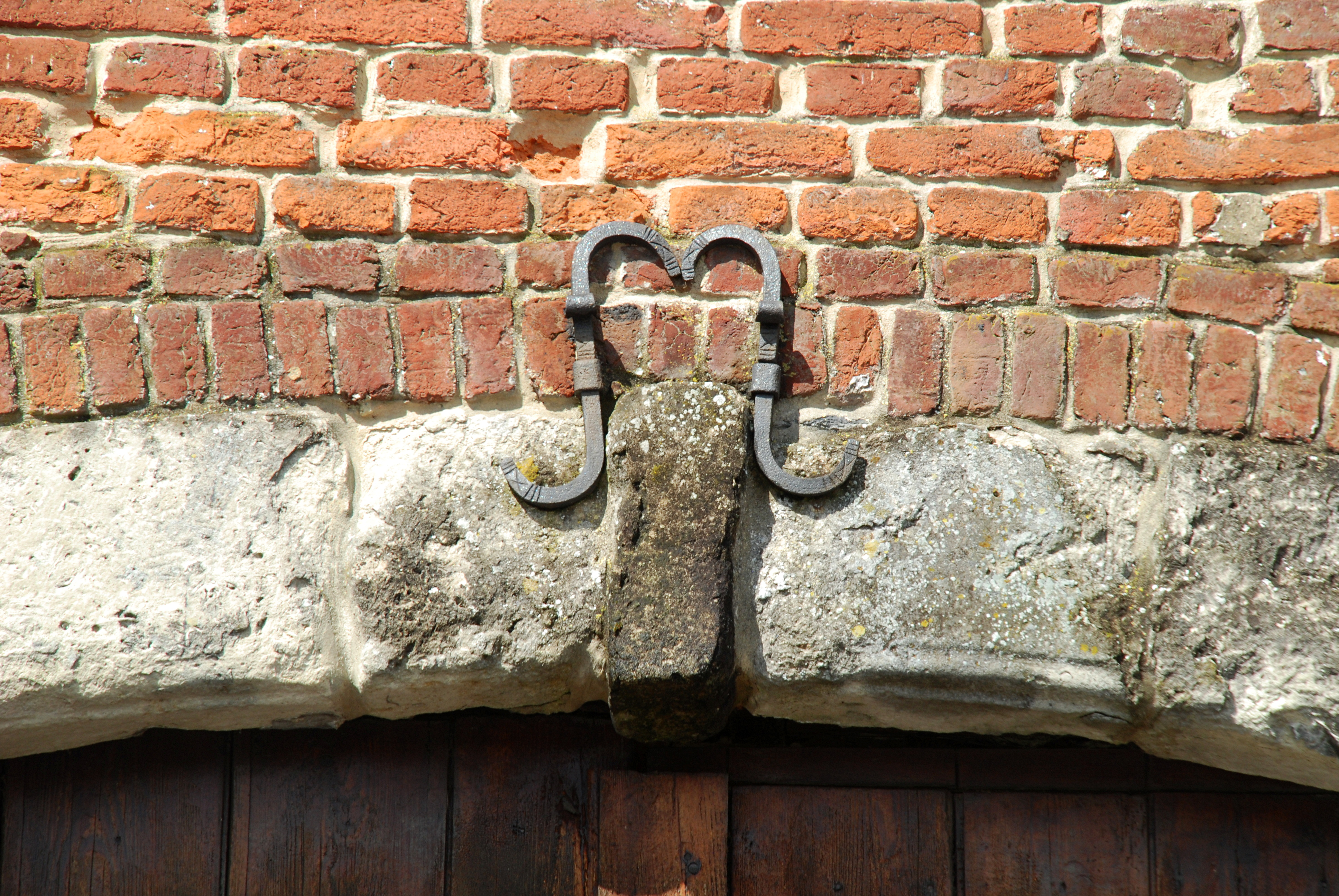 Belgique - Brabant wallon - Ottignies - Manoir de Franquenies